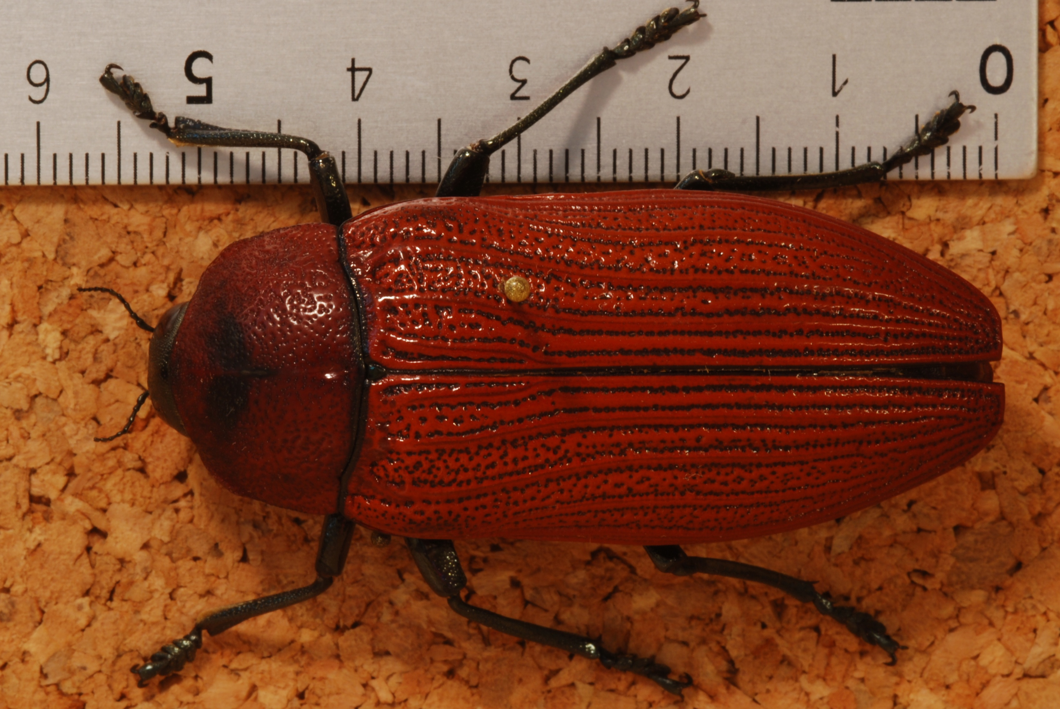 Hyden, Western Australia, AUSTRALIA